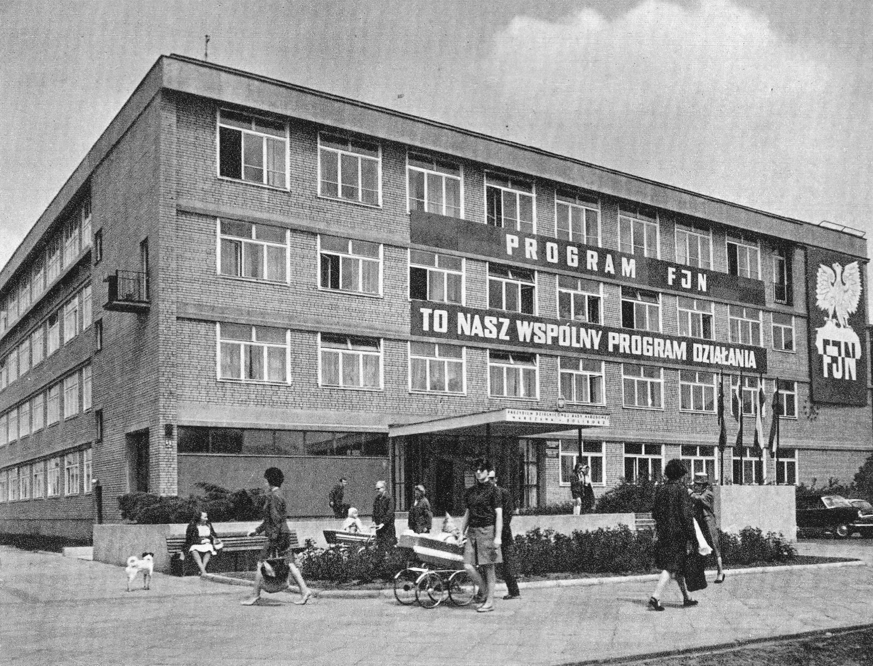 Budynek Prezydium Dzielnicowej Rady Narodowej (obecnie Urzędu Dzielnicy Żoliborz) przy ul. Słowackiego 6/8 w Warszawie